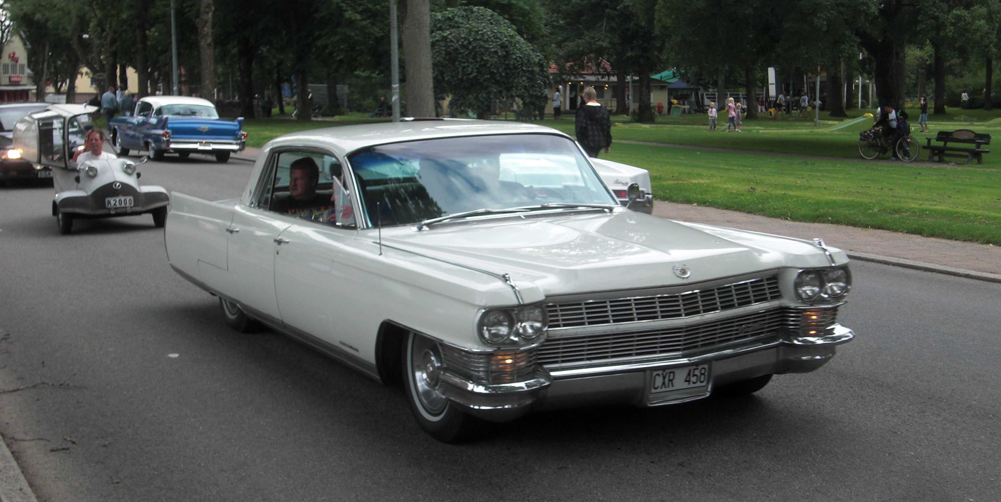 En Cadillac Fleetwood 1964 på cruising på Ströget (Sankt Olofsgatan) i Falköping 2010-07-31.